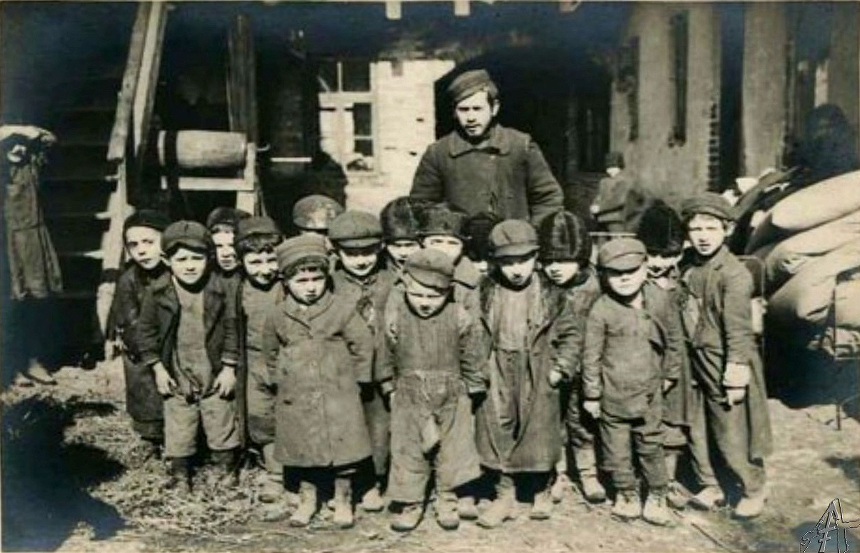 Jędrzejów. Cheder - szkoła żydowska dla chłopców w wieku od 3. lub 5. do 13. lat